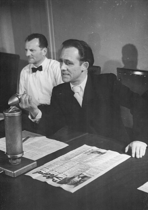 Der "Verhaftete" gab eine Pressekonferenz. Prof. Henselmann, der Direktor der Weimarer Kunsthochschule, der nach einer Meldung des amerikanisch-lizensierten "Abend" angeblich verhaftet worden sein sollte, veranstaltete am 19.7.1949 im Gebäude der Verwaltung für Volksbildung eine Pressekonferenz, um damit die lügnerische Meldung zu wiederlegen. Gleichzeitig gab er bekannt, dass er den Herausgeber des "Abend", Müller-Jabusch, heute in seiner Redaktion besucht habe, dieser sich aber geweigert hätte, die Eigenmeldung zu widerrufen. UBz: Prof. Henselmann nimmt zu der Falschmeldung Stellung. Aufn.: Illus Heilig 3607-49 19.7.1949